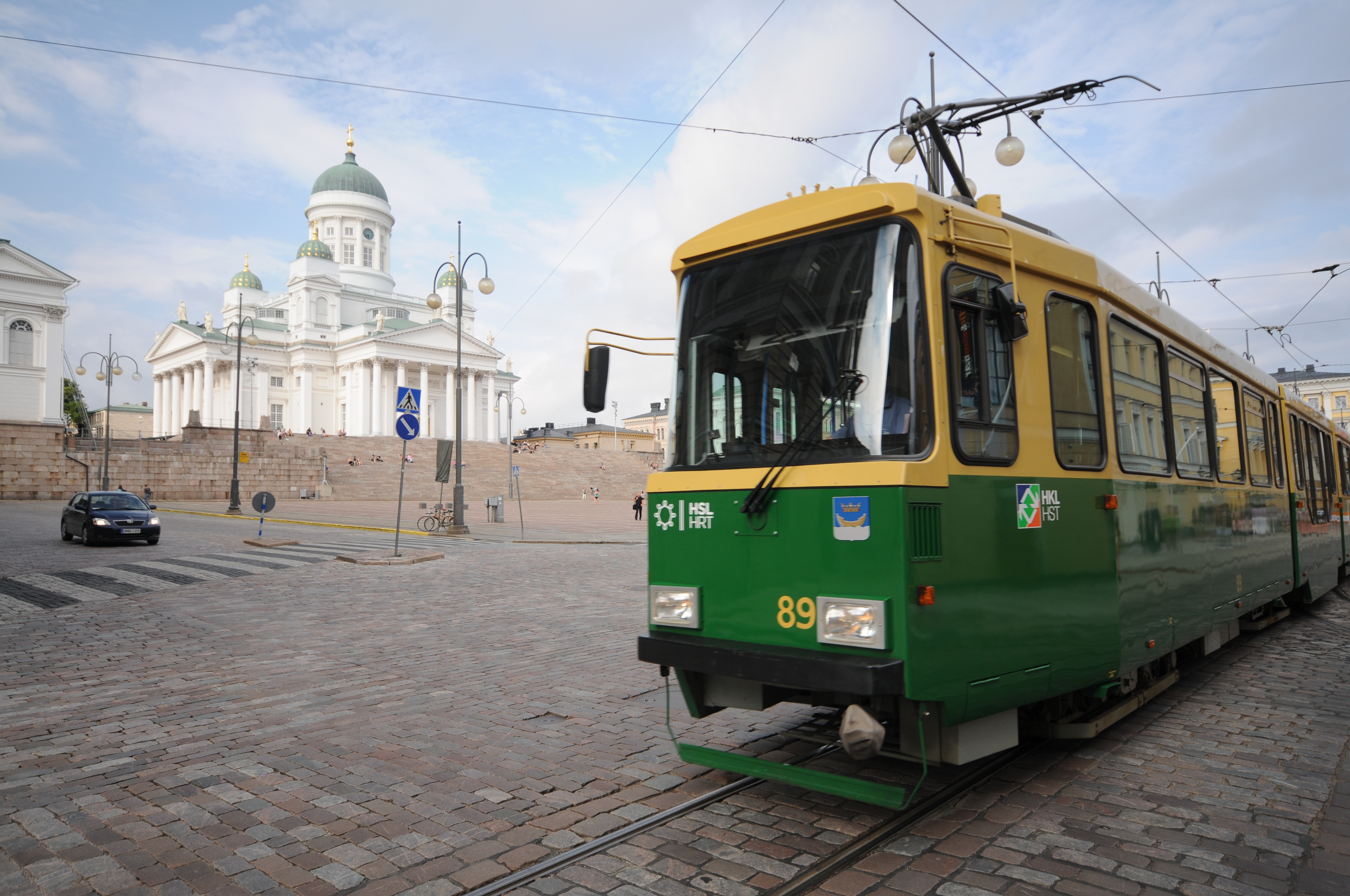 Helsinki